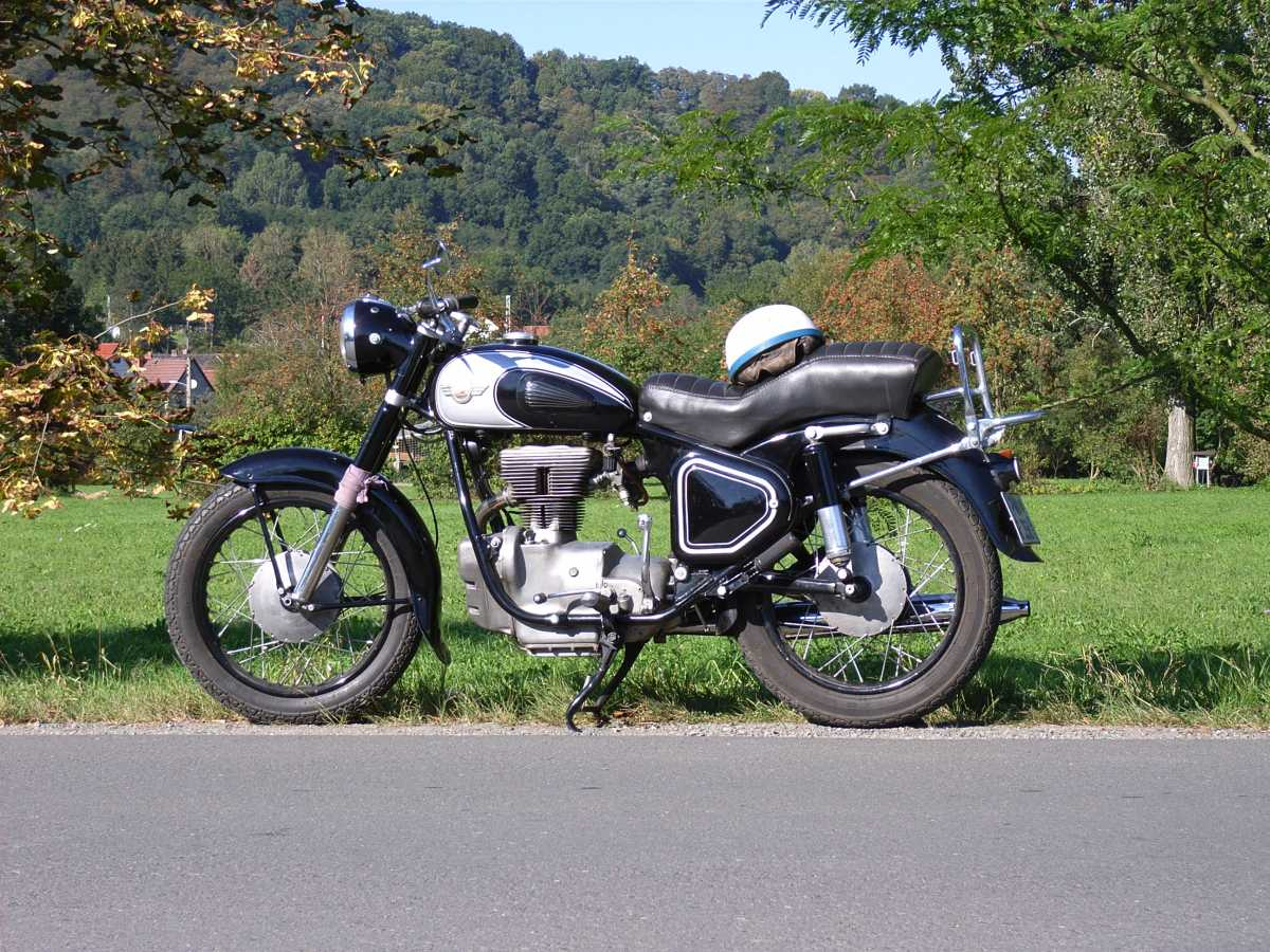 Awo Sport im Alltagszustand. Der hintere Gepäckträger wurde nachträglich montiert. Die Sitzbank ersetzt entweder die meist verbauten Gummi-Doppelsitze oder wurde nachträglich abgesteppt. Das vordere Teleskopgabelrohr leckt und wurde mit einem Lappen gegen Verschmutzen geschützt.